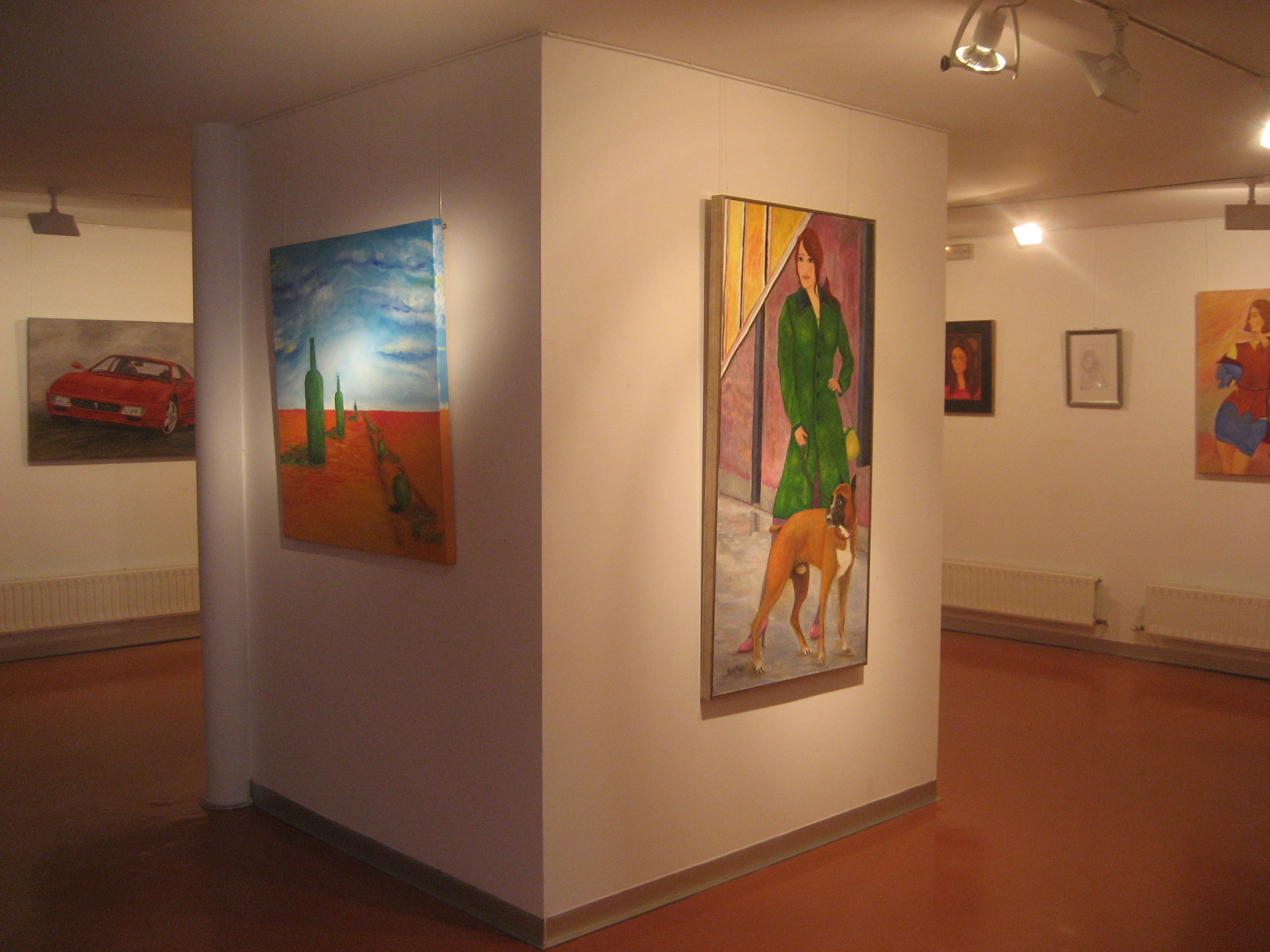 Exposición 2010